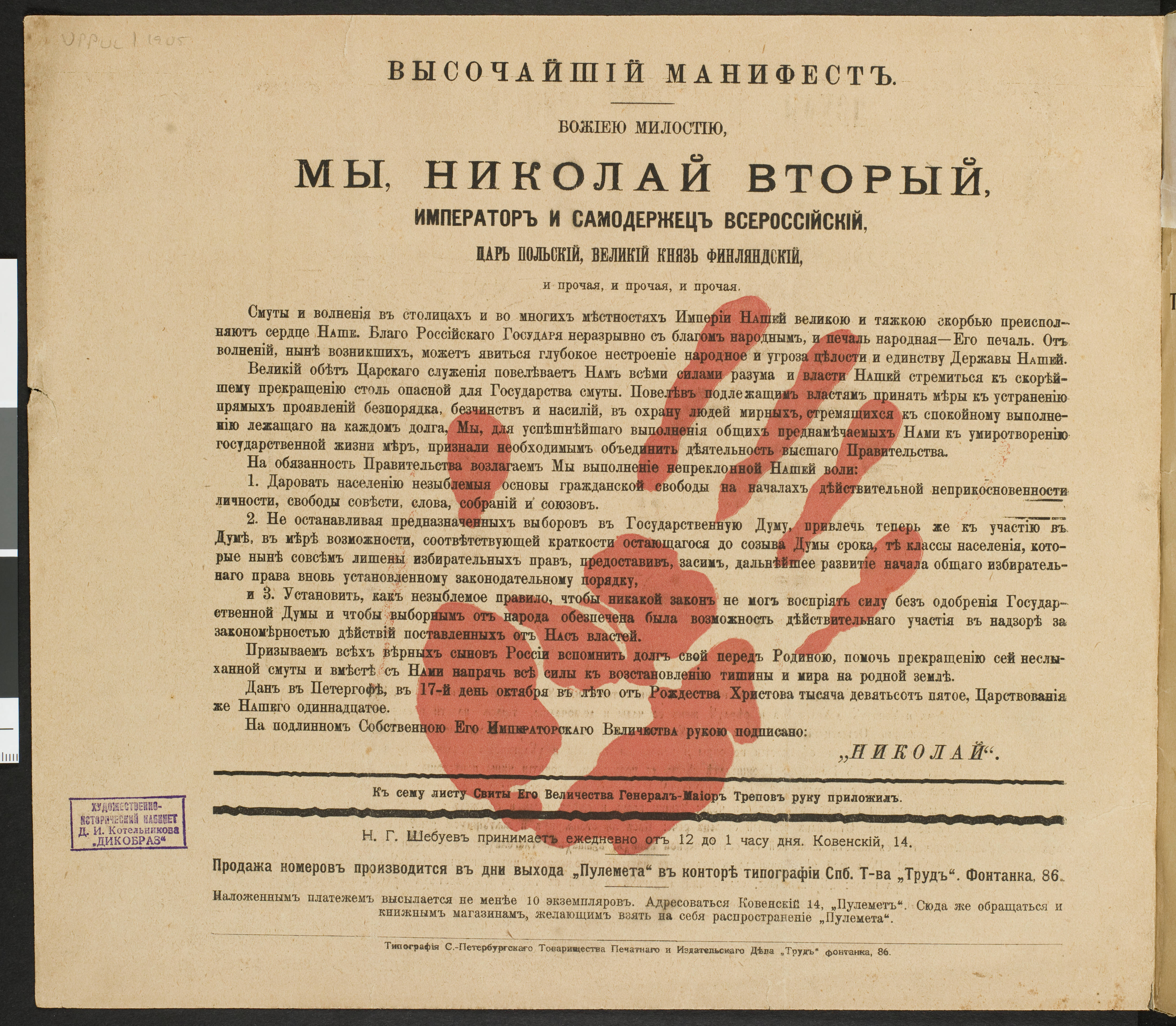 Задняя сторона обложки журнала "Пулемёт", №1, 1905 год. Изображён текст "Манифеста 17 октября", на который нанесён кровавый отпечаток ладони. Подпись под рисунком гласилт: «К сему листу свиты его величества генерал-майор Трепов руку приложил».